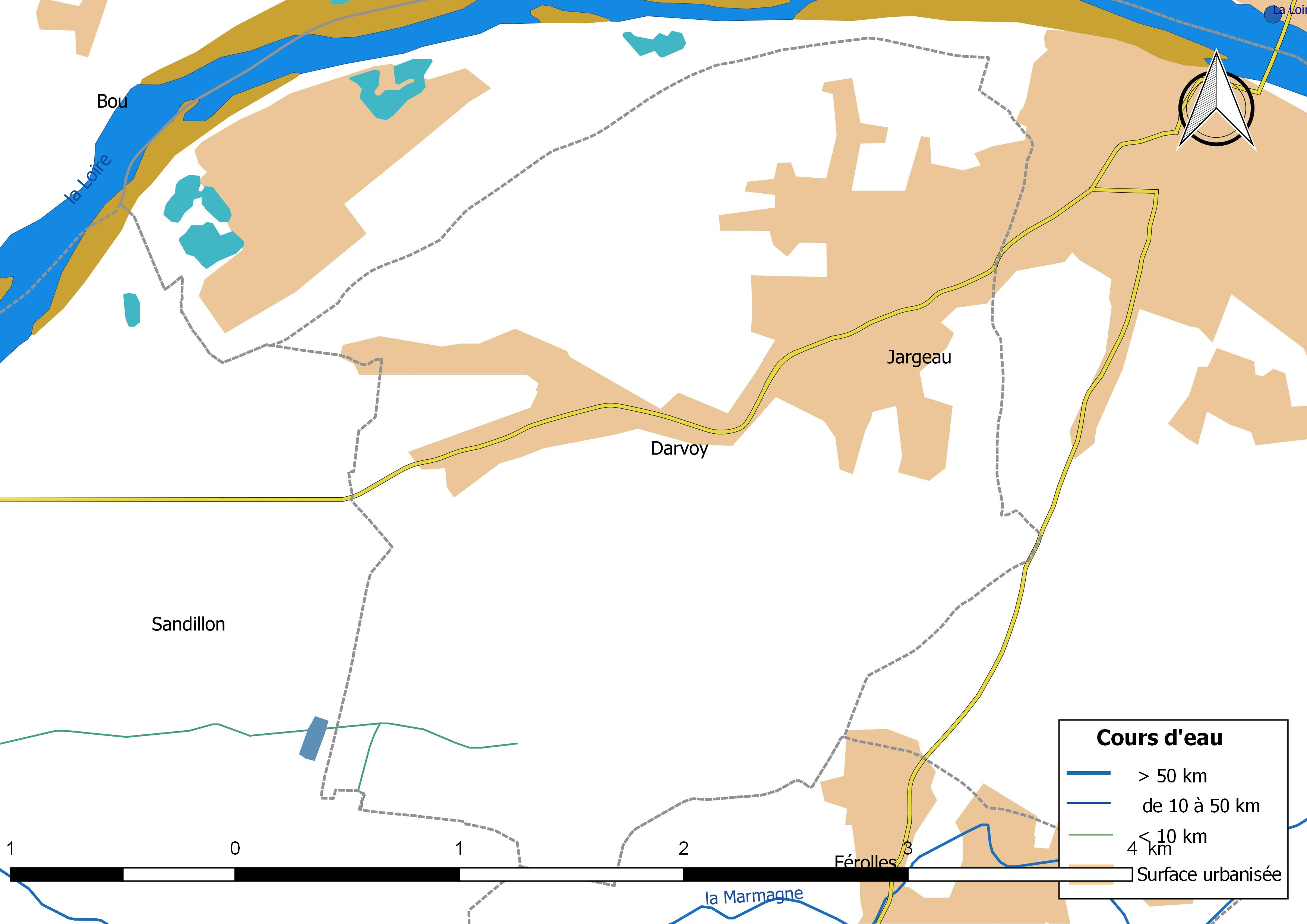 Carte du réseau hydrographique de la commune de Darvoy (France).